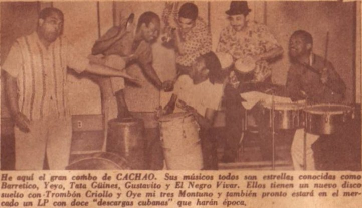 Cachao y su Combo.